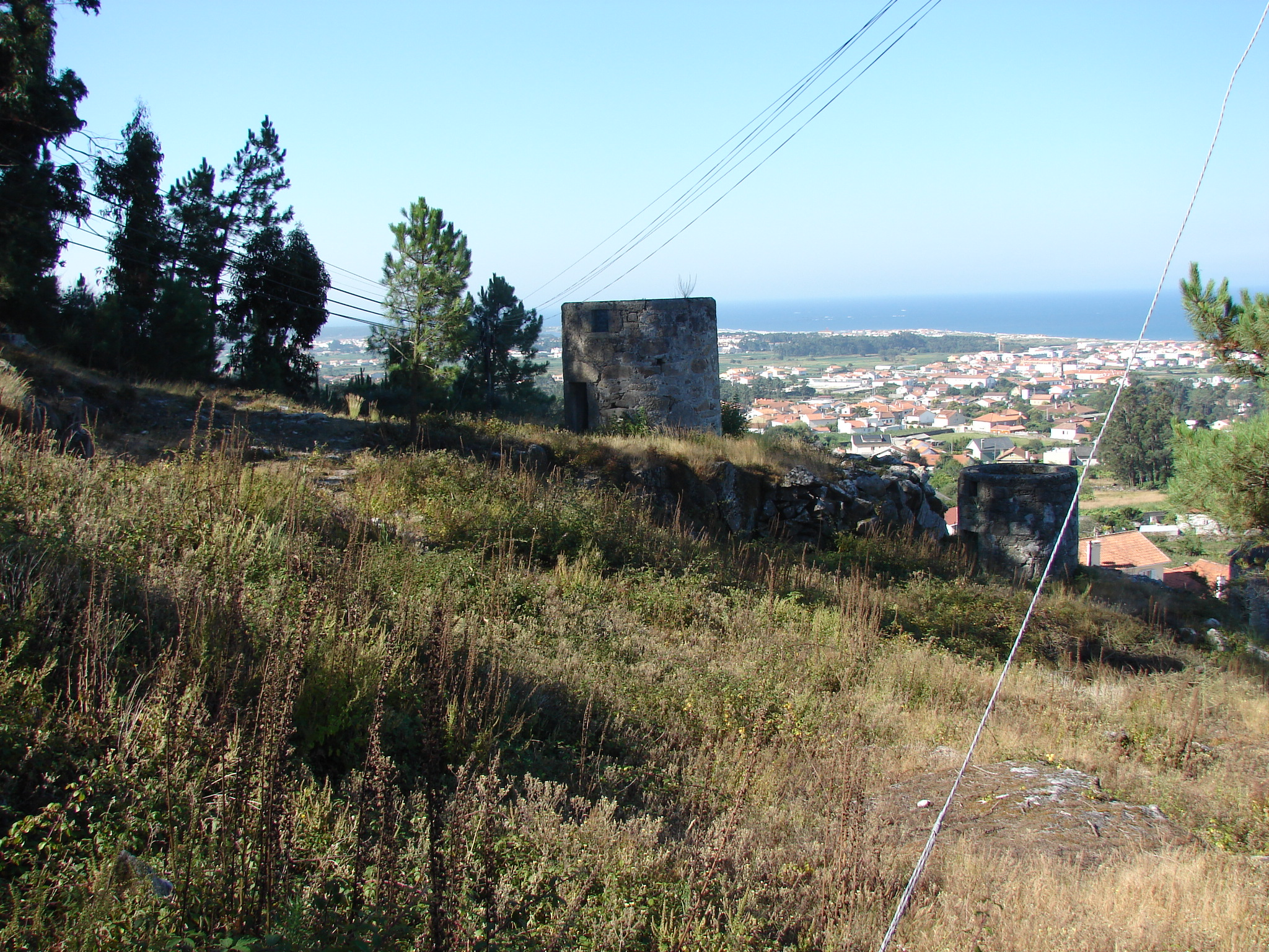 Moinhos da Abelheira